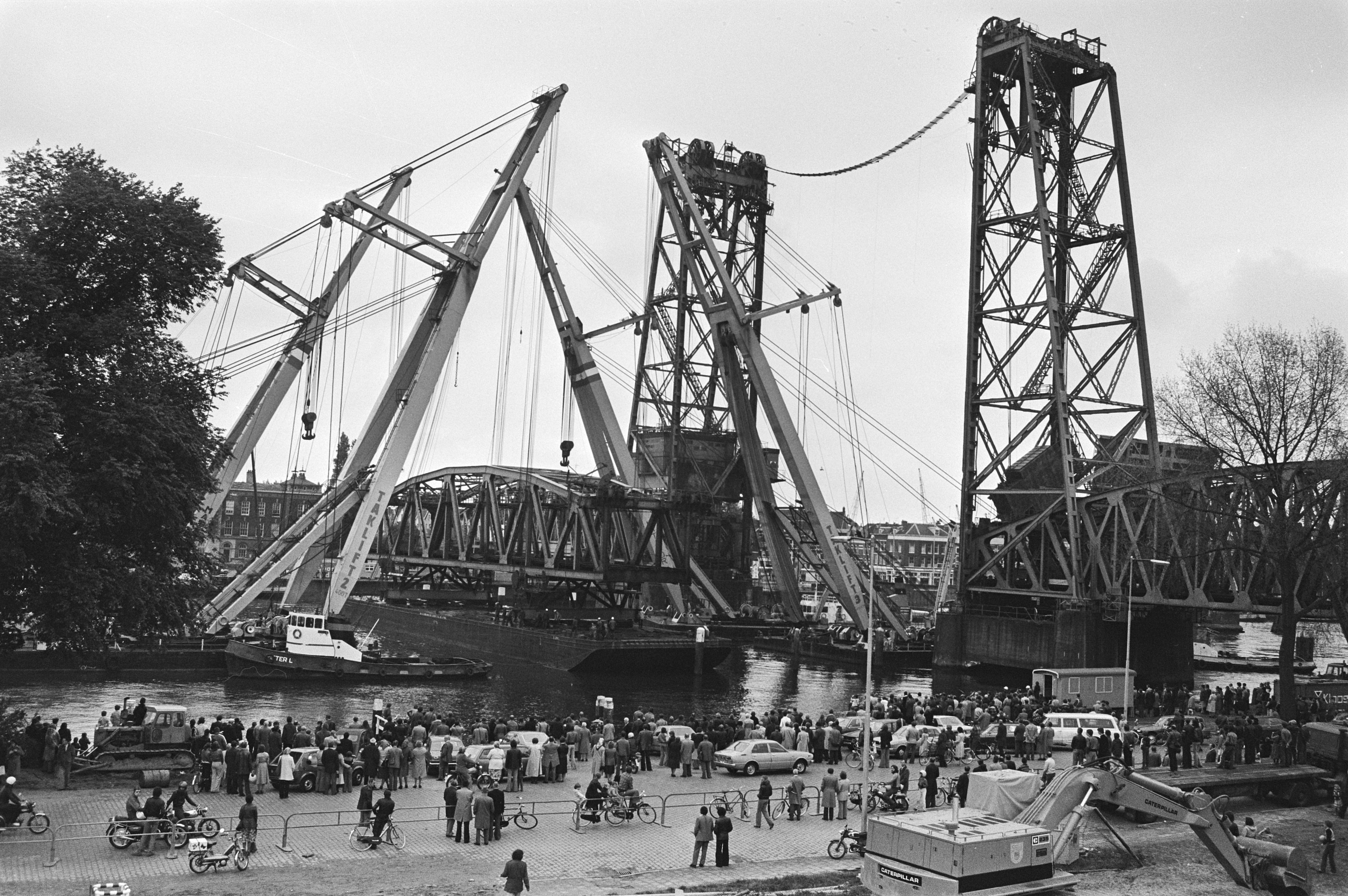 Collectie / Archief : Fotocollectie Anefo Reportage / Serie : [ onbekend ] Beschrijving : Beschadigde gedeelte Koningshavenbrug in Rotterdam door 4 grote bokken uitgetakeld en op grote schuit geplaatst Datum : 15 mei 1978 Locatie : Rotterdam, Zuid-Holland Trefwoorden : BRUGGEN Fotograaf : Bogaerts, Rob / Anefo Auteursrechthebbende : Nationaal Archief Materiaalsoort : Negatief (zwart/wit) Nummer archiefinventaris : bekijk toegang 2.24.01.05 Bestanddeelnummer : 929-7193